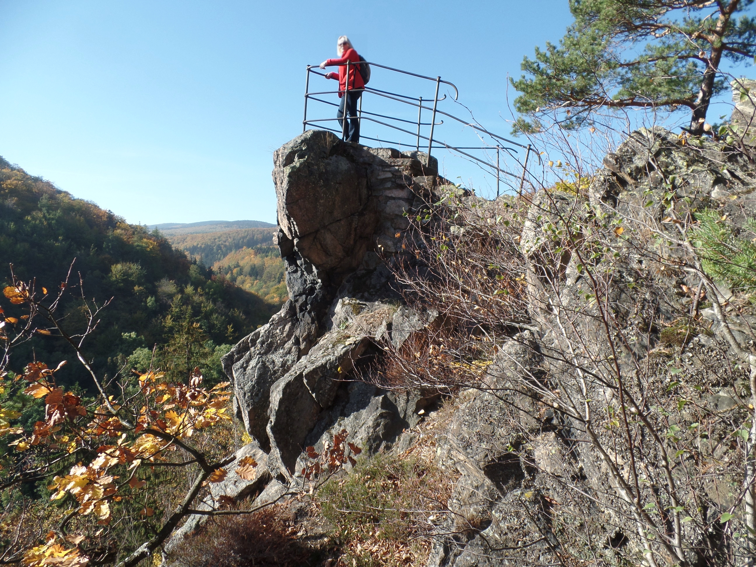 Čertovy kazatelny w Račí údolí Skała Diabelska ambona